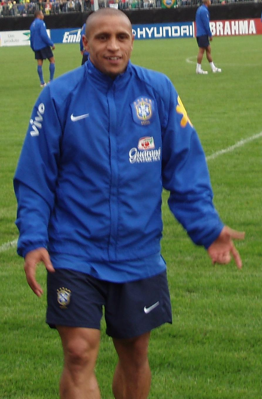 Roberto Carlos, Spieler der brasilianischen Fußballnationalmannschaft